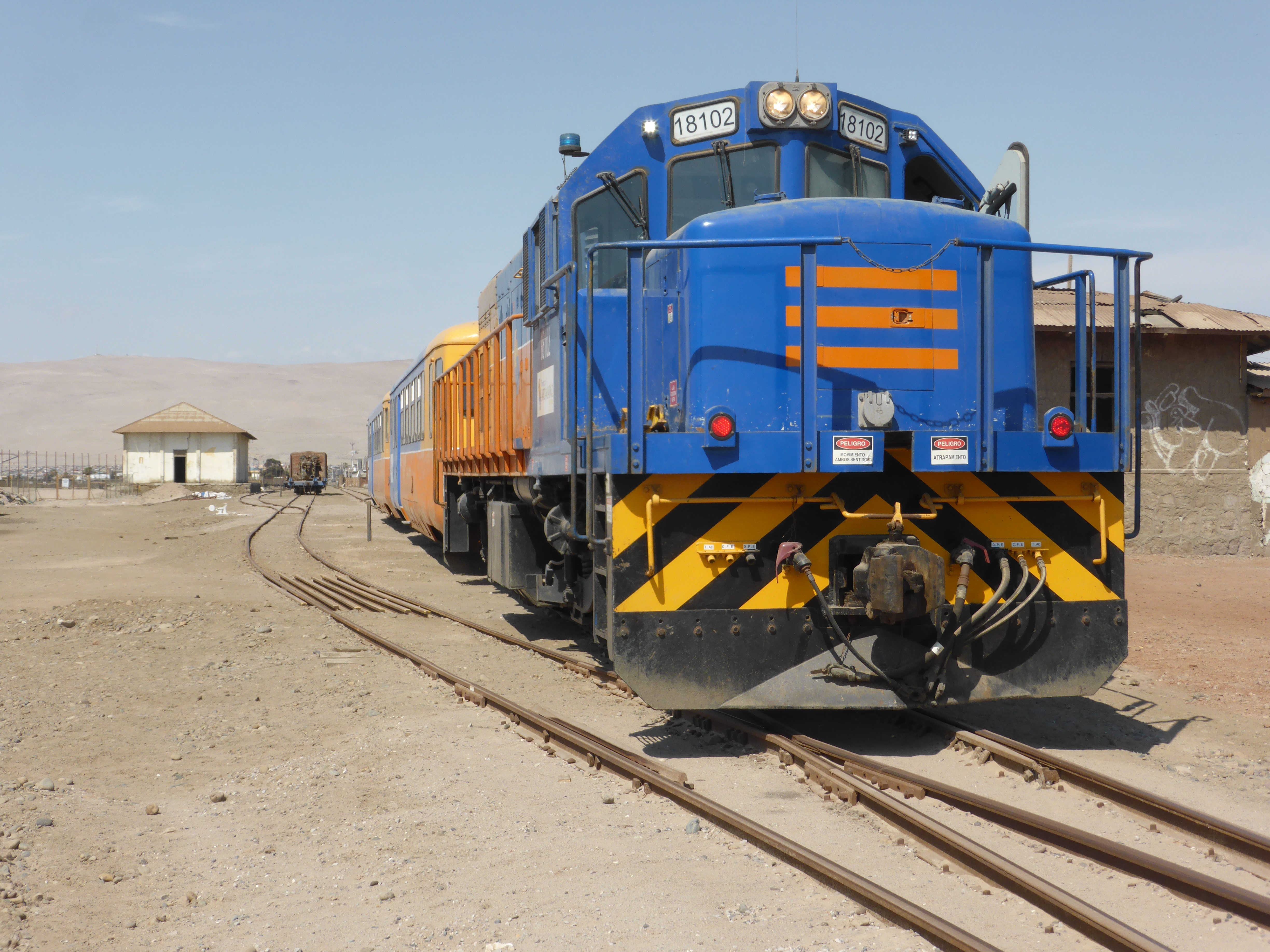 Desde la Maestranza Chinchorro, o estación Chinchorro, de la ciudad de Arica, al norte de Chile, sale semanalmente el tren turístico que circula por un tramo de la línea del Ferrocarril de Arica a La Paz (FCALP), hasta la estación Poconchile (y a veces hasta Central, a 70 kilómetros de Arica). La locomotora es una General Electric del año 1967, modernizada. Ancho de vía 1000 milímetros, o "trocha métrica". Vía estrecha de un metro.